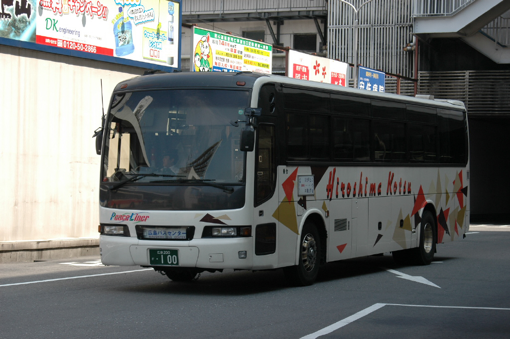 広島バスセンターにて 2005-9-20撮影